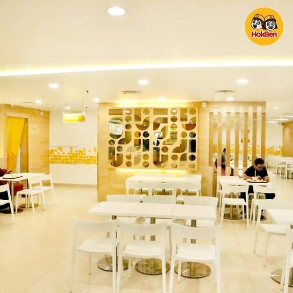 Bagian dalam Restoran HokBen fX Sudirman